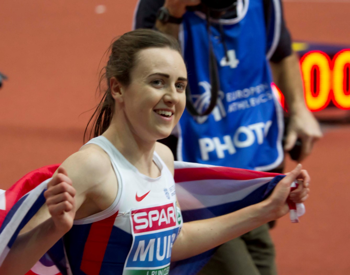 312 3000m muir ereronde